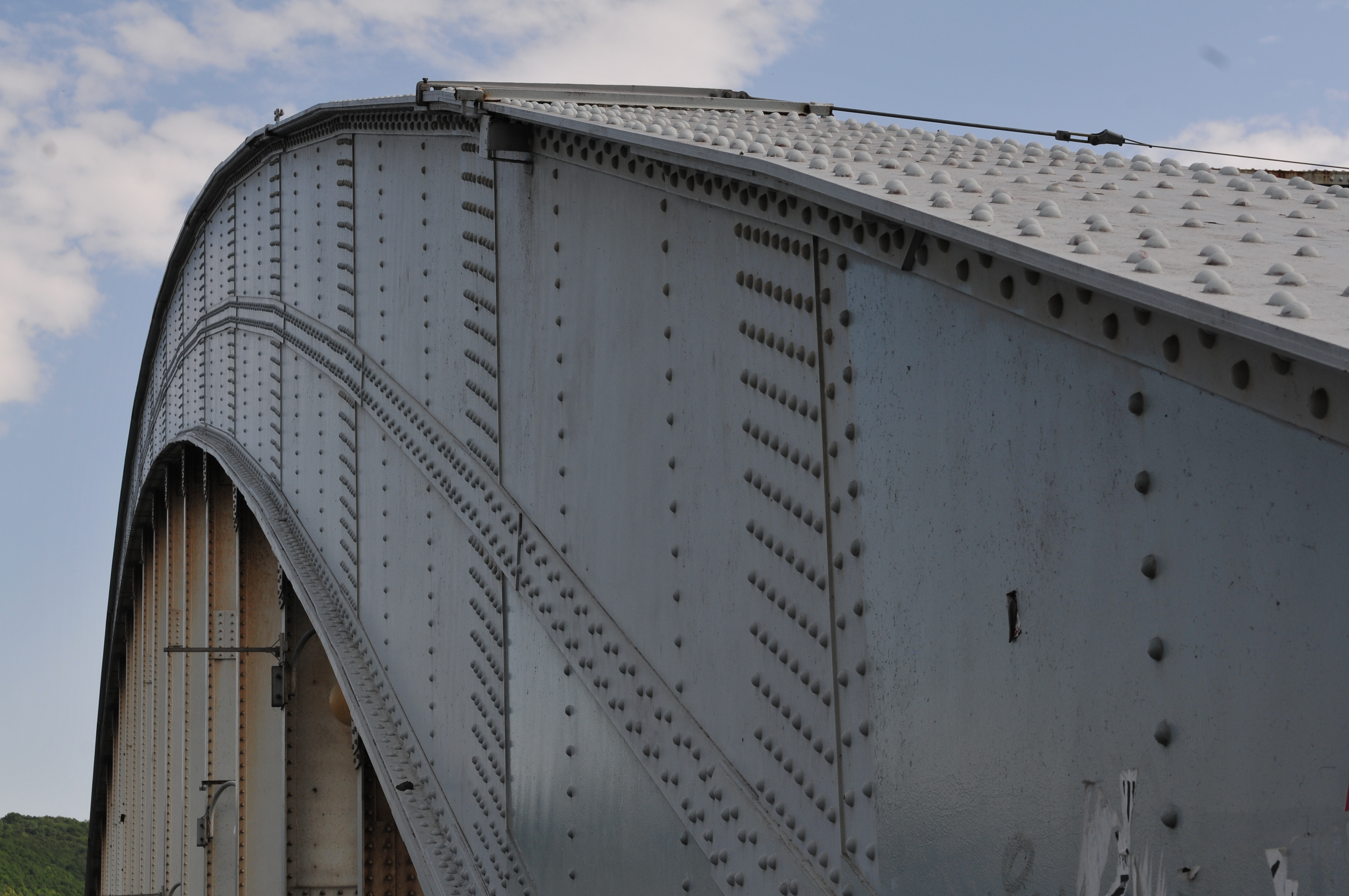 Ústí nad Labem